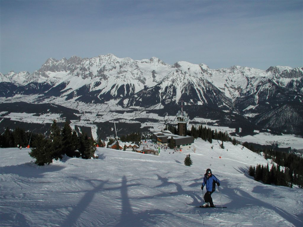 Schigebiet Schladming, Planai. Im Hintergrund der Dachstein